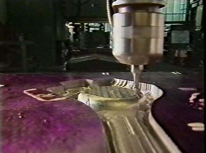 Süllyesztékszeszám készítése marással